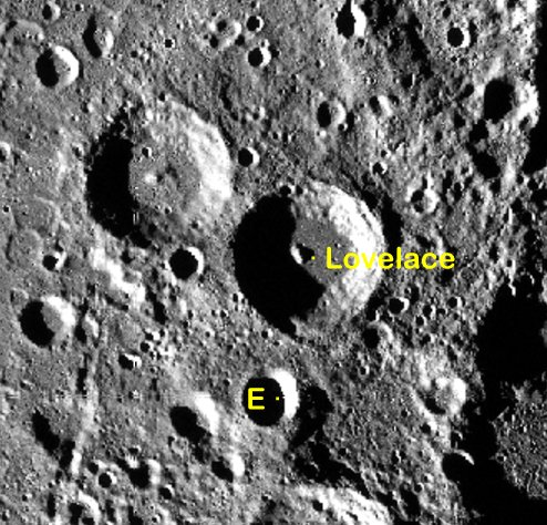 Cráter lunar Lovelace. Cráteres satélite. )Imagen LRO)